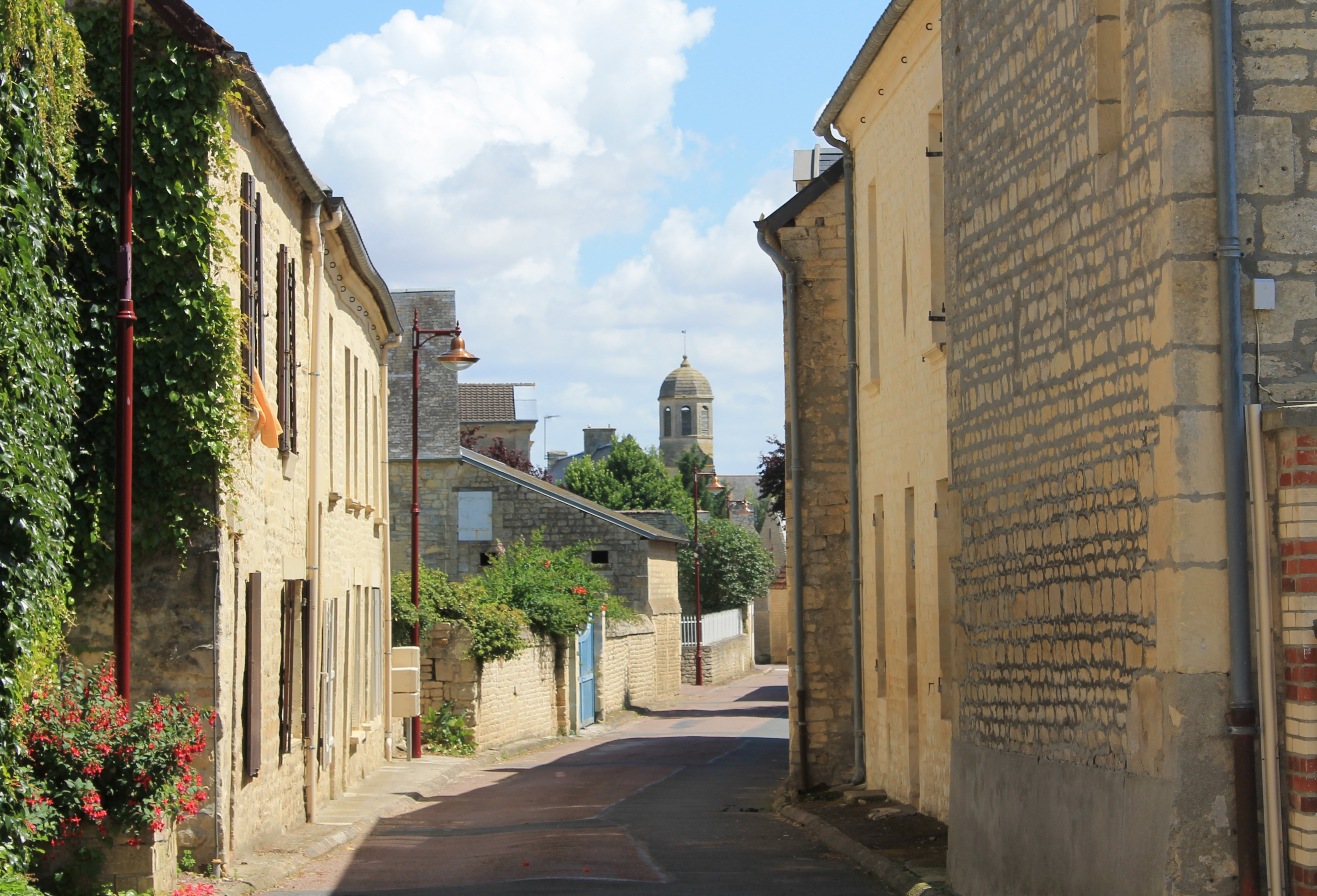 Rue de l'église à Sainte-Croix-Grand-Tonne (Calvados)